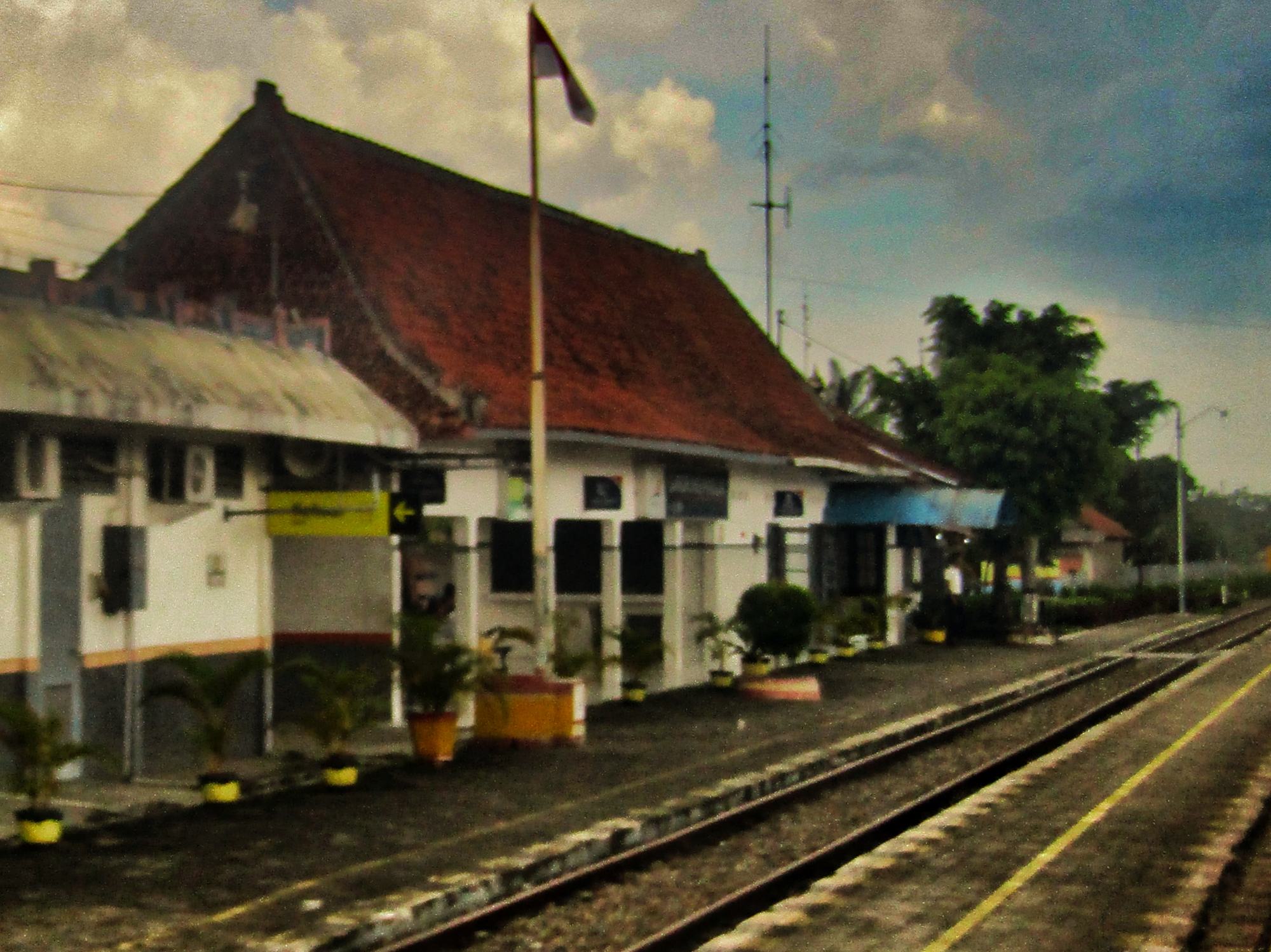 Bangunan utama Stasiun Gandrungmangun, 2020